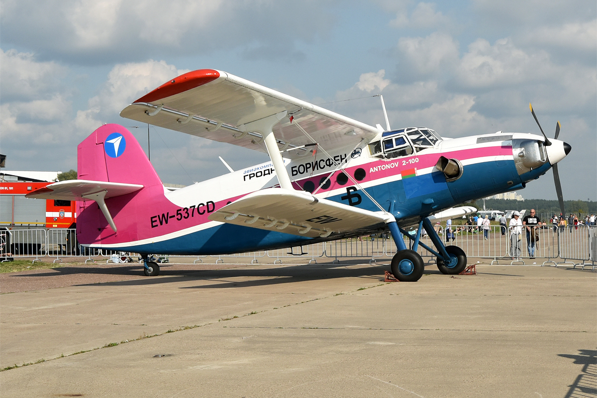 Grodno Aviakompania, EW-537CD, Antonov An-2-100